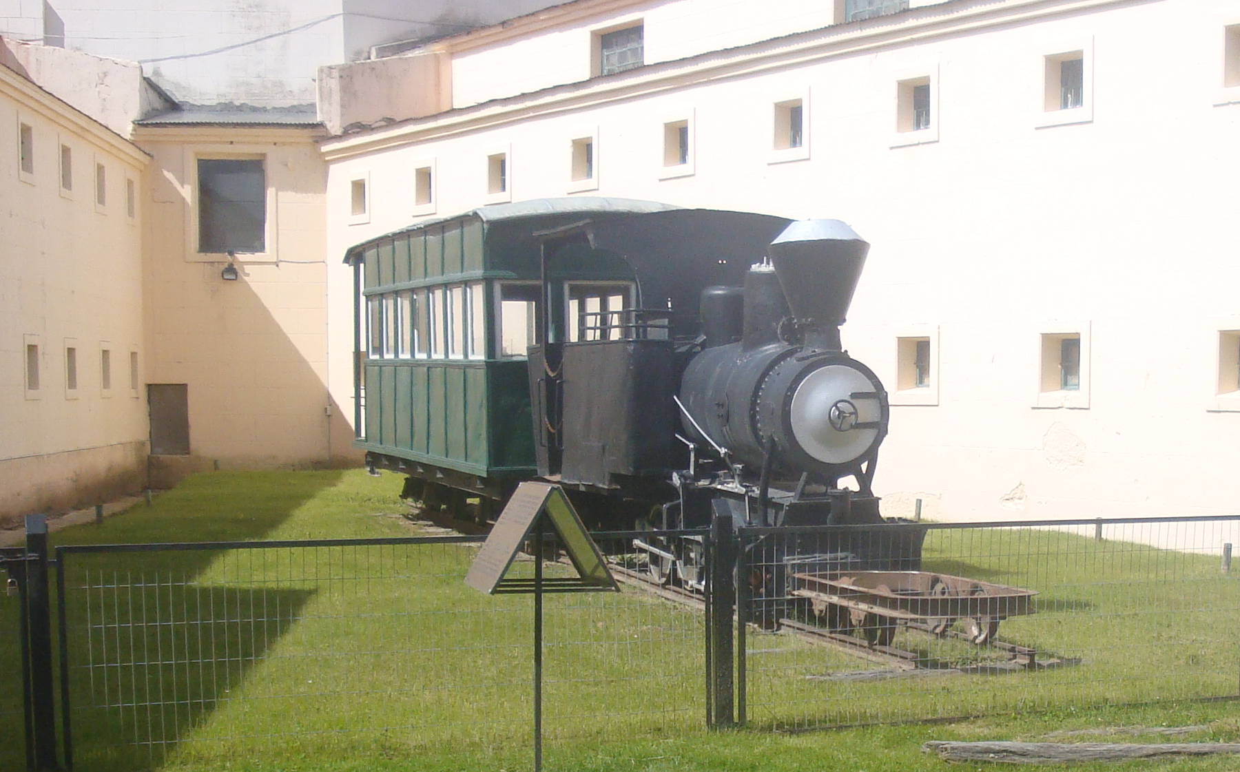 Formación utilizada originalmente para el servicio de pasajeros estacionada en el Presidio.